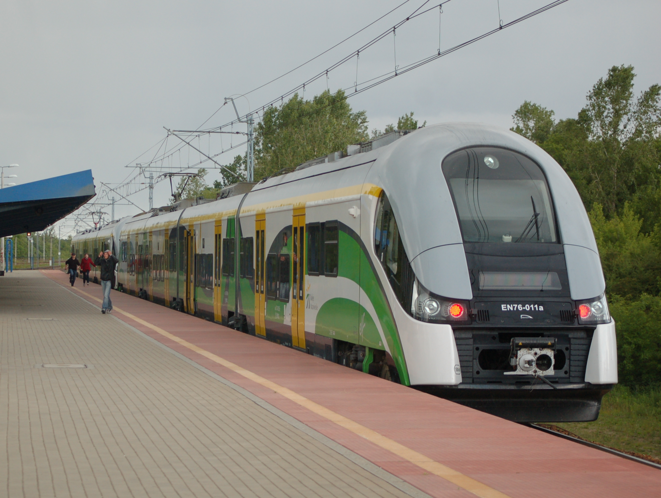 Warszawa Żerań.